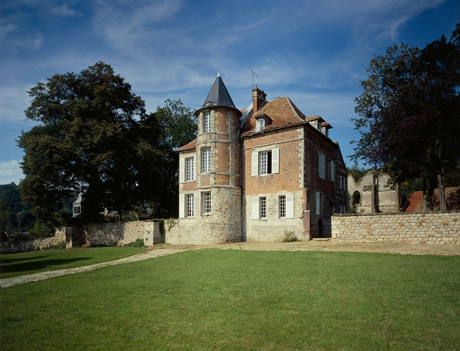 Castel of Béhéricourt